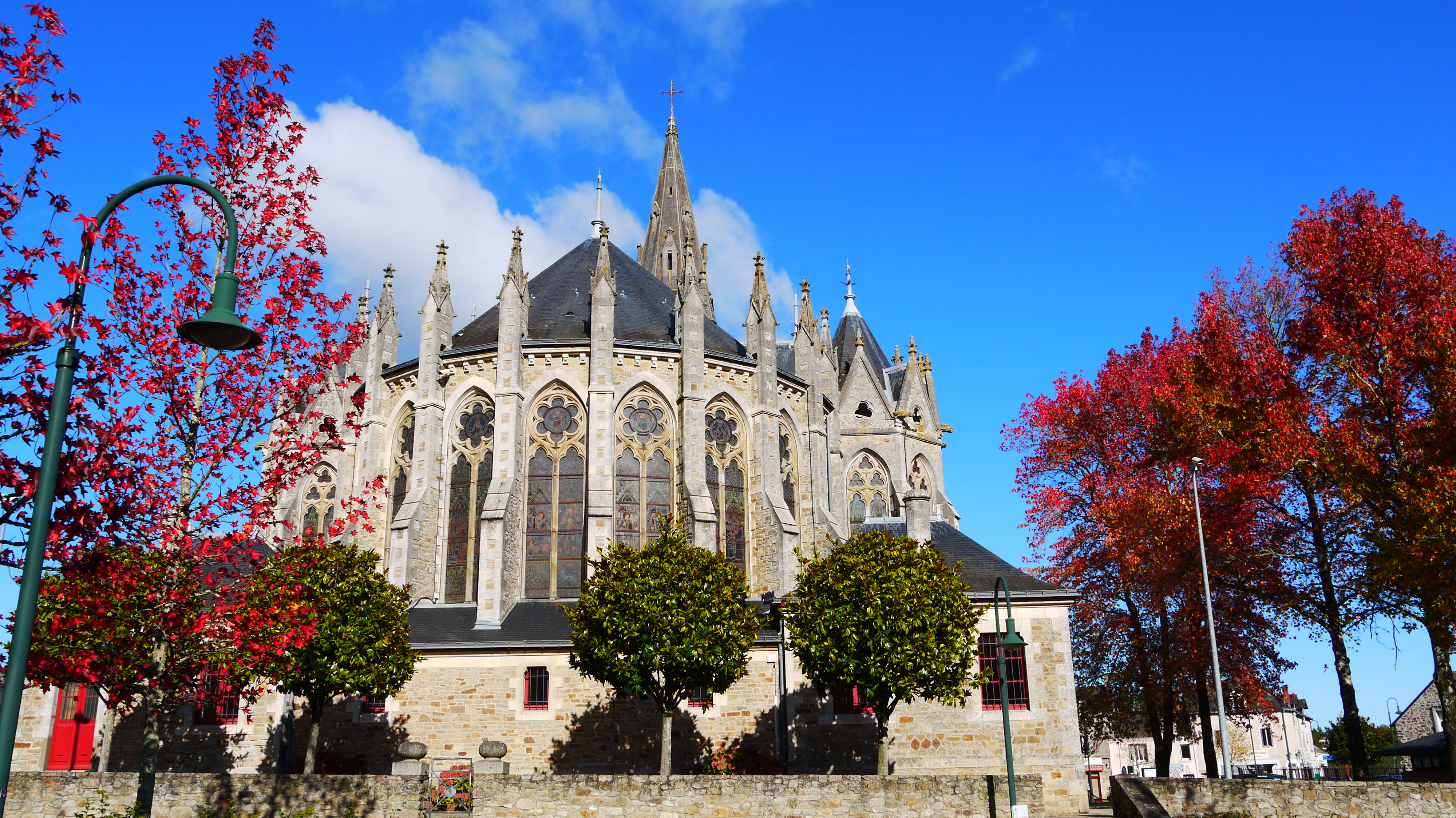 Chevet de l'église Saint Léger d'Orvault à l'automne 2012 Loire-Atlantique - France